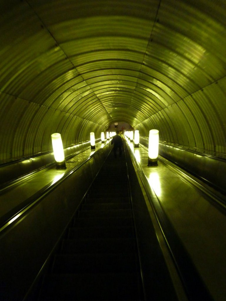 Днепропетровск. Спуск в метро на станцию "Метробудівників"